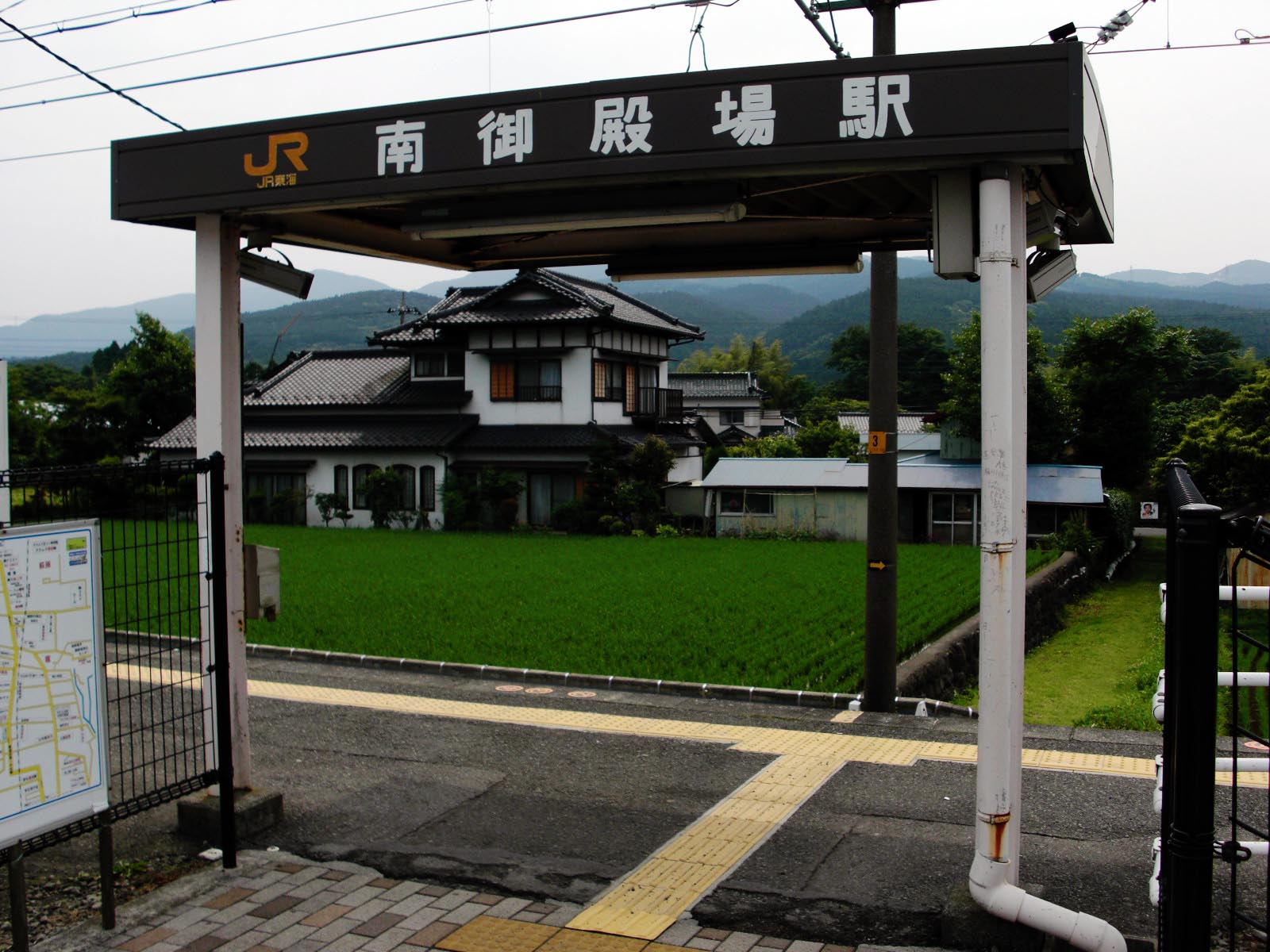 御殿場市竈、JR東海 南御殿場駅ホーム入口。